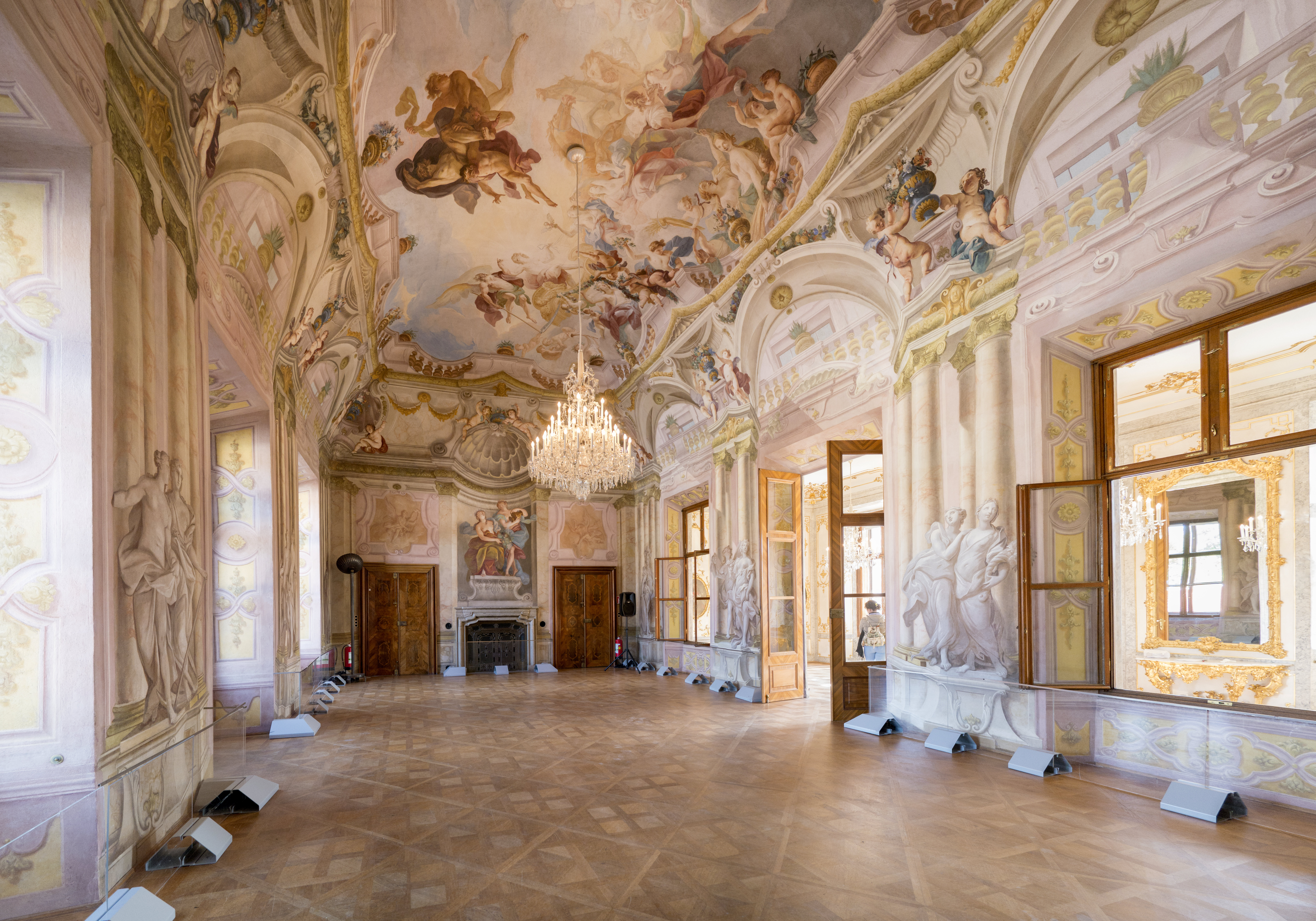 Schloss Hetzendorf – Festsaal und Chinesisches Zimmer Dieses Bild wurde anlässlich des österreichischen Tags des Denkmals 2014 in Wien eingereicht.